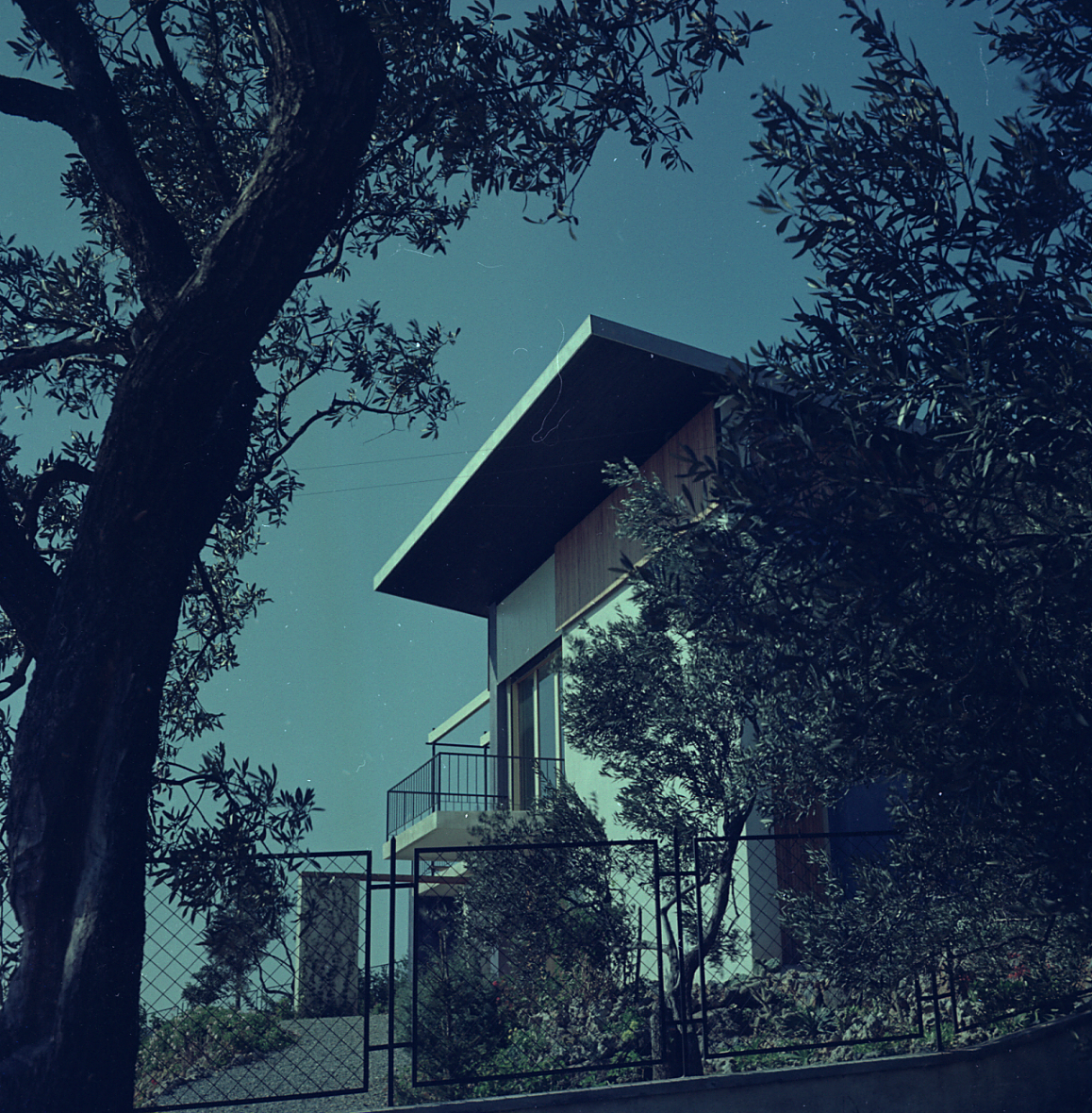 Servizio fotografico : Italia, 1960 / Paolo Monti. - Buste: 12, Fototipi: 12 : Negativo colore, sviluppo cromogeno/ pellicola ; 6x6. - ((Serie costituita da 12 negativi identificati con i nn.: RCN3070-3081. Sulla busta del negativo RC3070N manoscritto: "Arch. Pozzi". La suddetta serie è contenuta nella scatola identificata con la numerazione RC2945N/3112N. Sul coperchio della scatola, manoscritto a pennarello: "Colore/N".